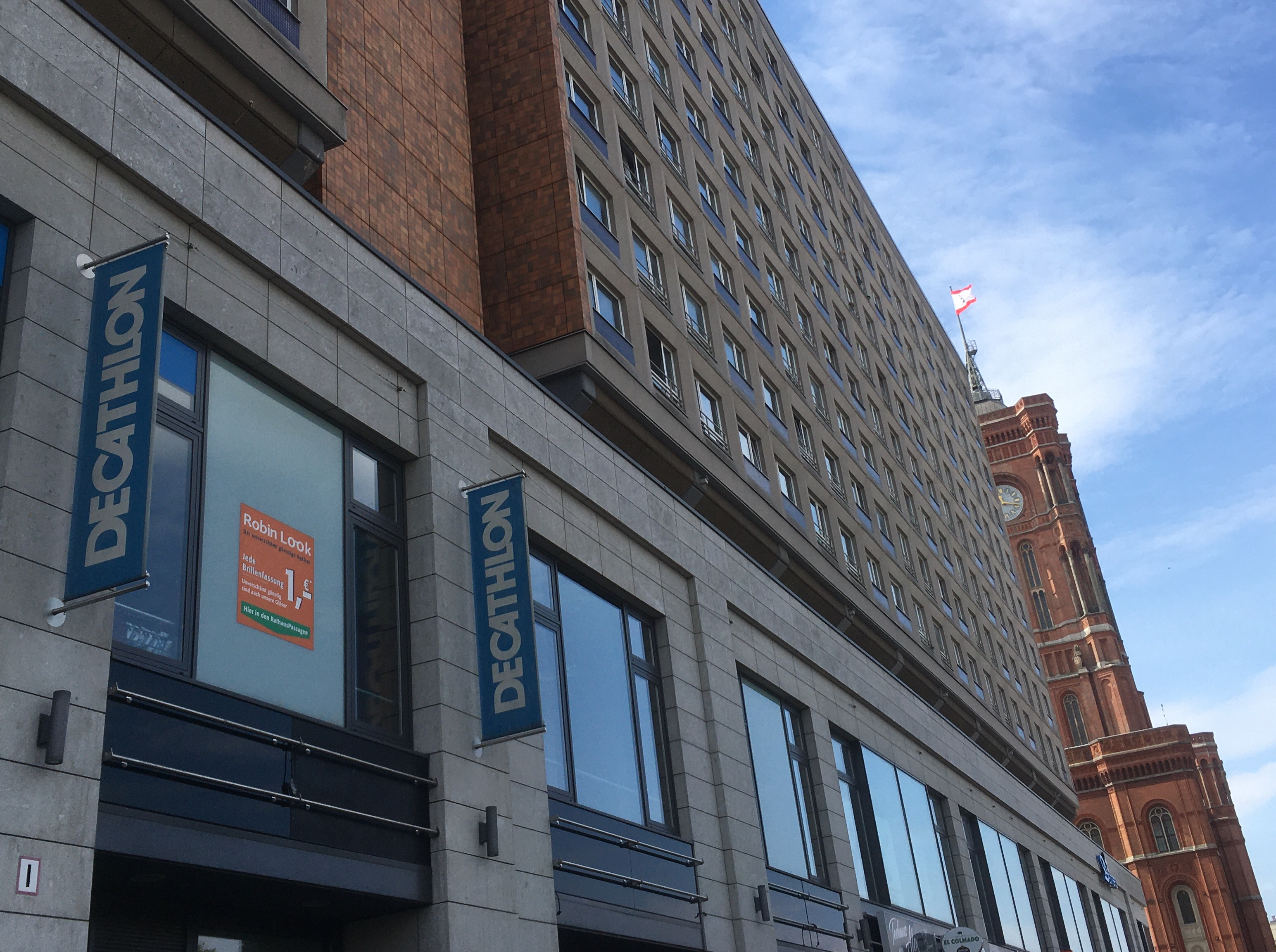 Decathlon-Filiale Berlin Alexanderplatz, Rotes Rathaus im Hintergrund